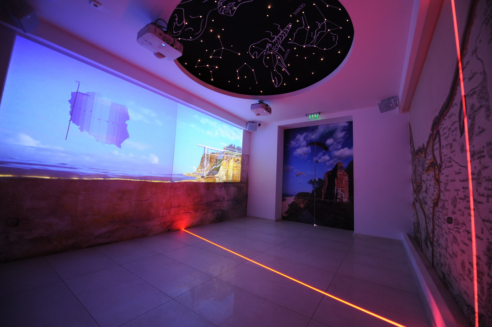 Multimedialna prezentacja przedstawiająca między innymi proces abrazji